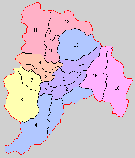 山形県最上郡の町村。